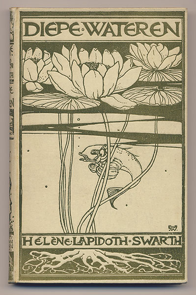 Boekomslag: Diepe Wateren. 1e druk 1897. Auteur: H. Lapidoth-Swarth. Bandontwerp: L.W.R. Wenckebach. Uitgeverij: P.N. van Kampen en Zoon